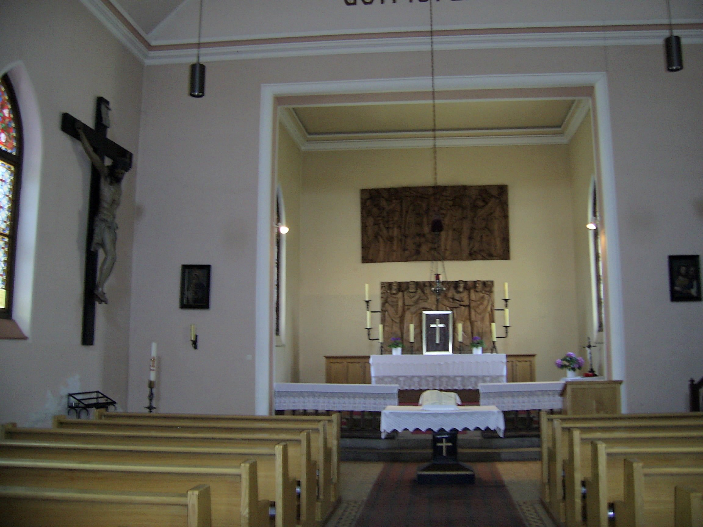 Innenansicht der Christuskirche, selbst fotografiert